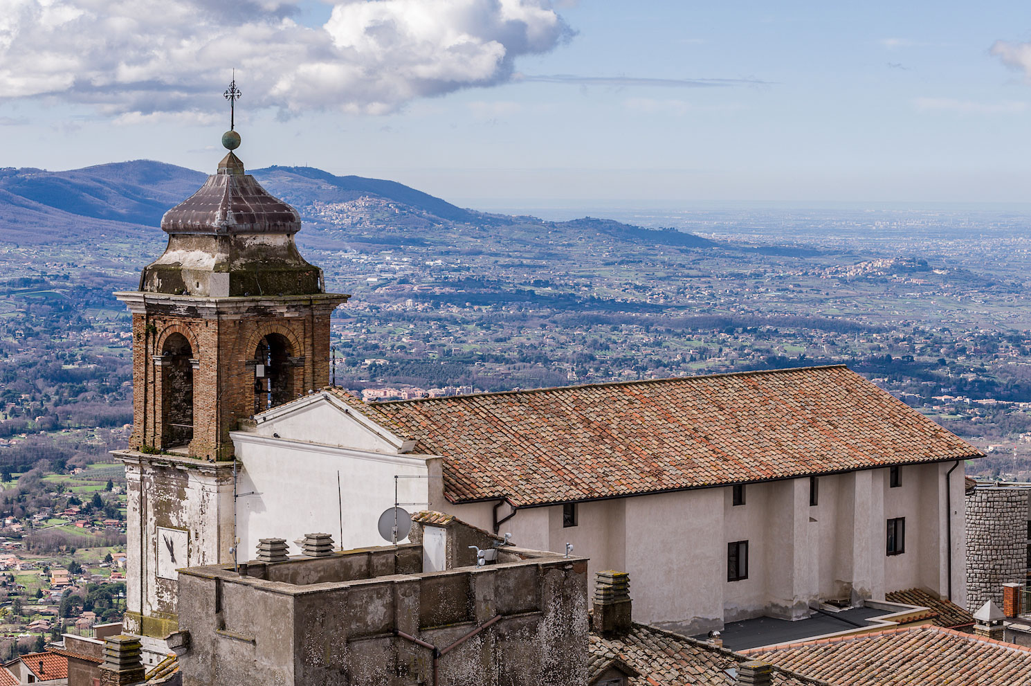 Chiesa di San Pietro e panorama sui Castelli Romani e Roma